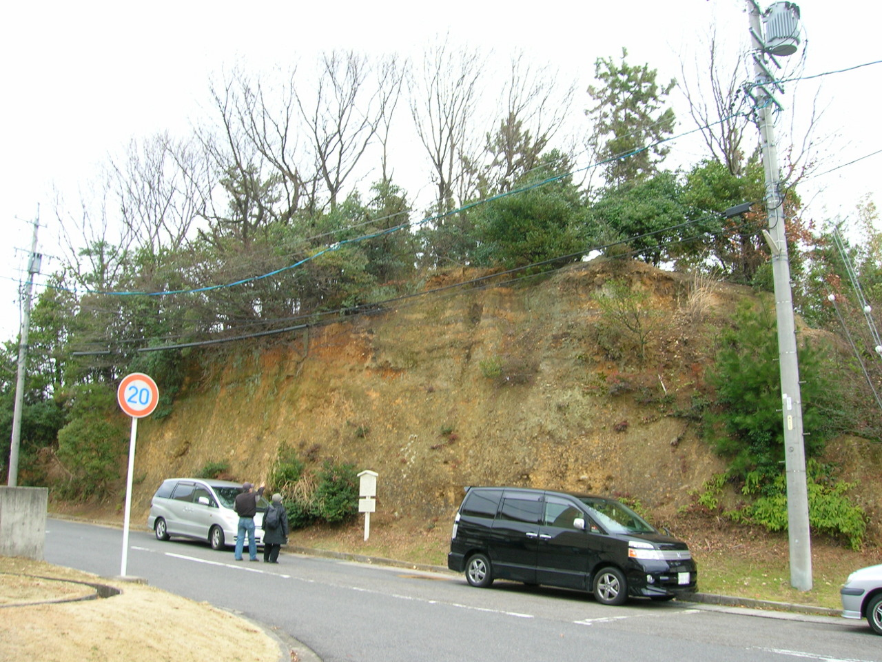 Obata Chausuyama kofun Loc: Moriyama-ku, Nagoya city, Aichi Prefecture, Japan. 小幡茶臼山古墳・後円部。 撮影場所 愛知県名古屋市守山区